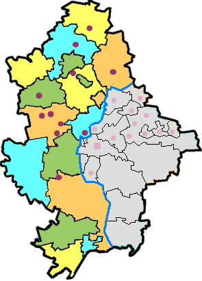 Карта Донецкой области, 2015 год